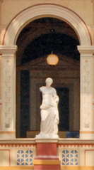 La Vénus d'Arles (sans bras). Détail de la cour des études de l'école des beaux-arts de Paris